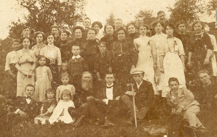 Свято у Ратищах, 1912 рік. Історія краю, фотографія з архіву родини Косара Григорія (1867-1918), пароха сс. Ратищі і Чистопади ( 1904-1915 рр.)